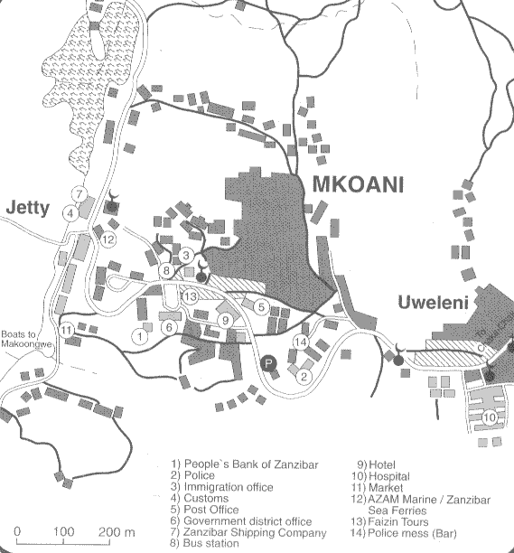 city map of Mkoani (Pemba)